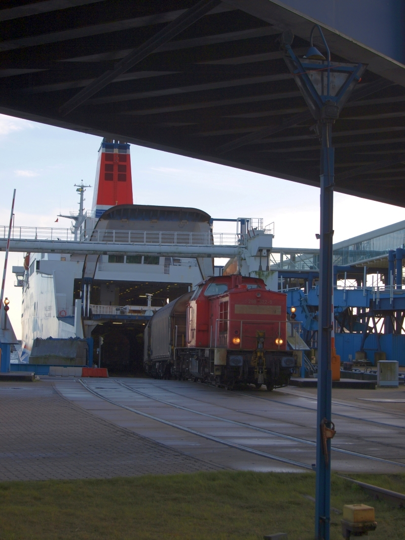 Fährschiff Trelleborg, Entladung im Fährhafen Sassnitz am 7. Januar 2014